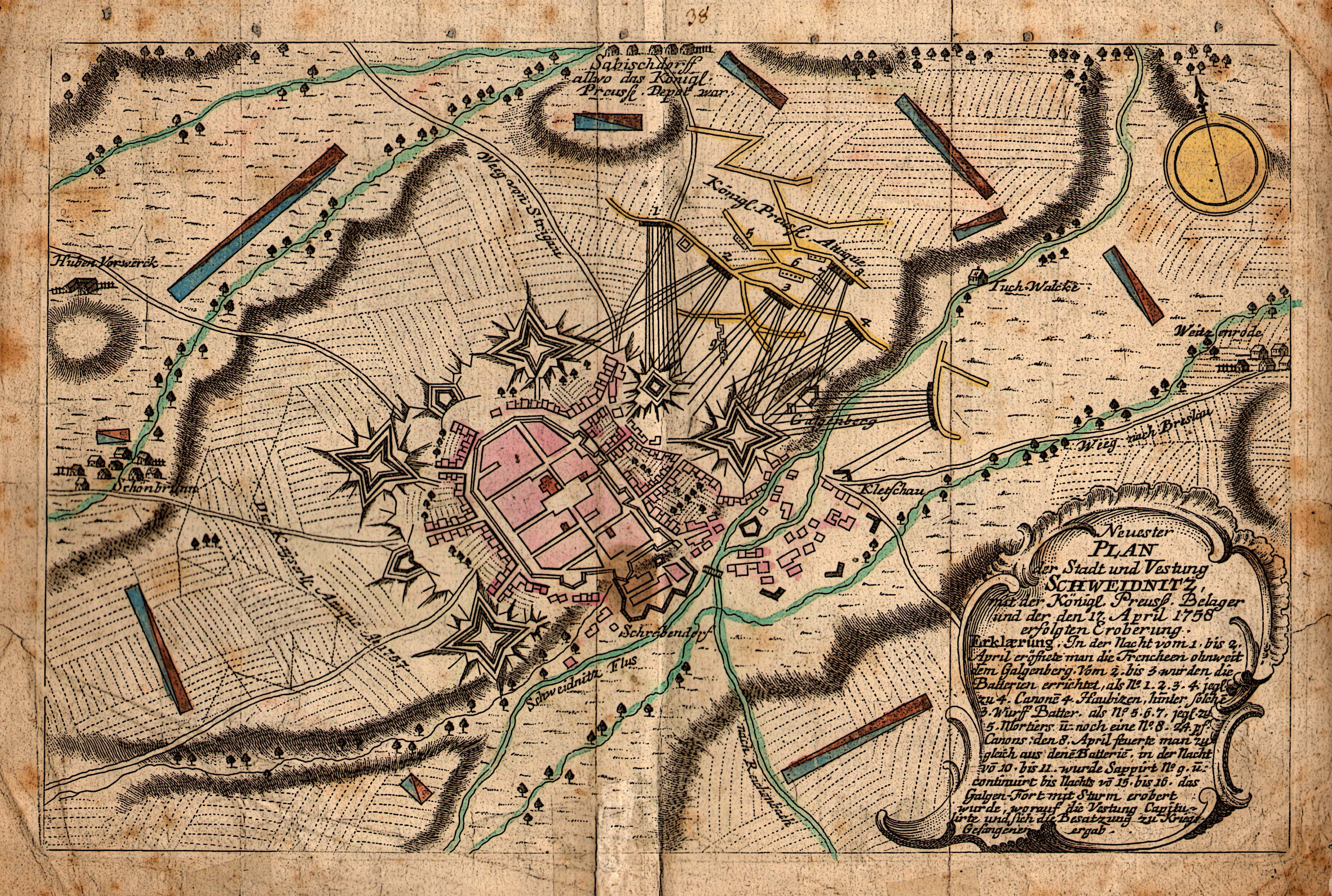 Karte zur Belagerung von Schweidnitz 1758